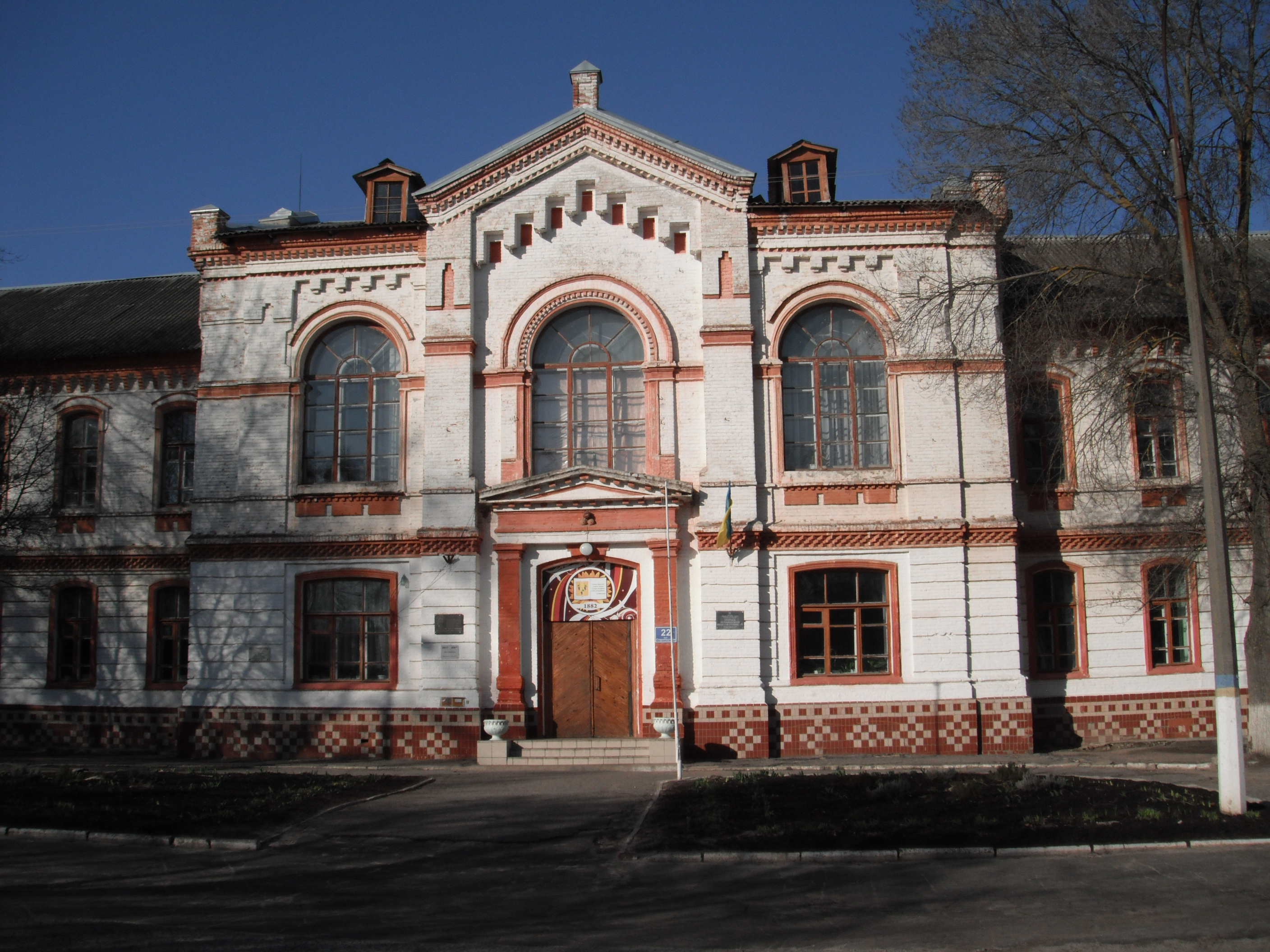 Ізюмська ЗОШ №4, колишнє Реальне училище збудоване 1882 р.